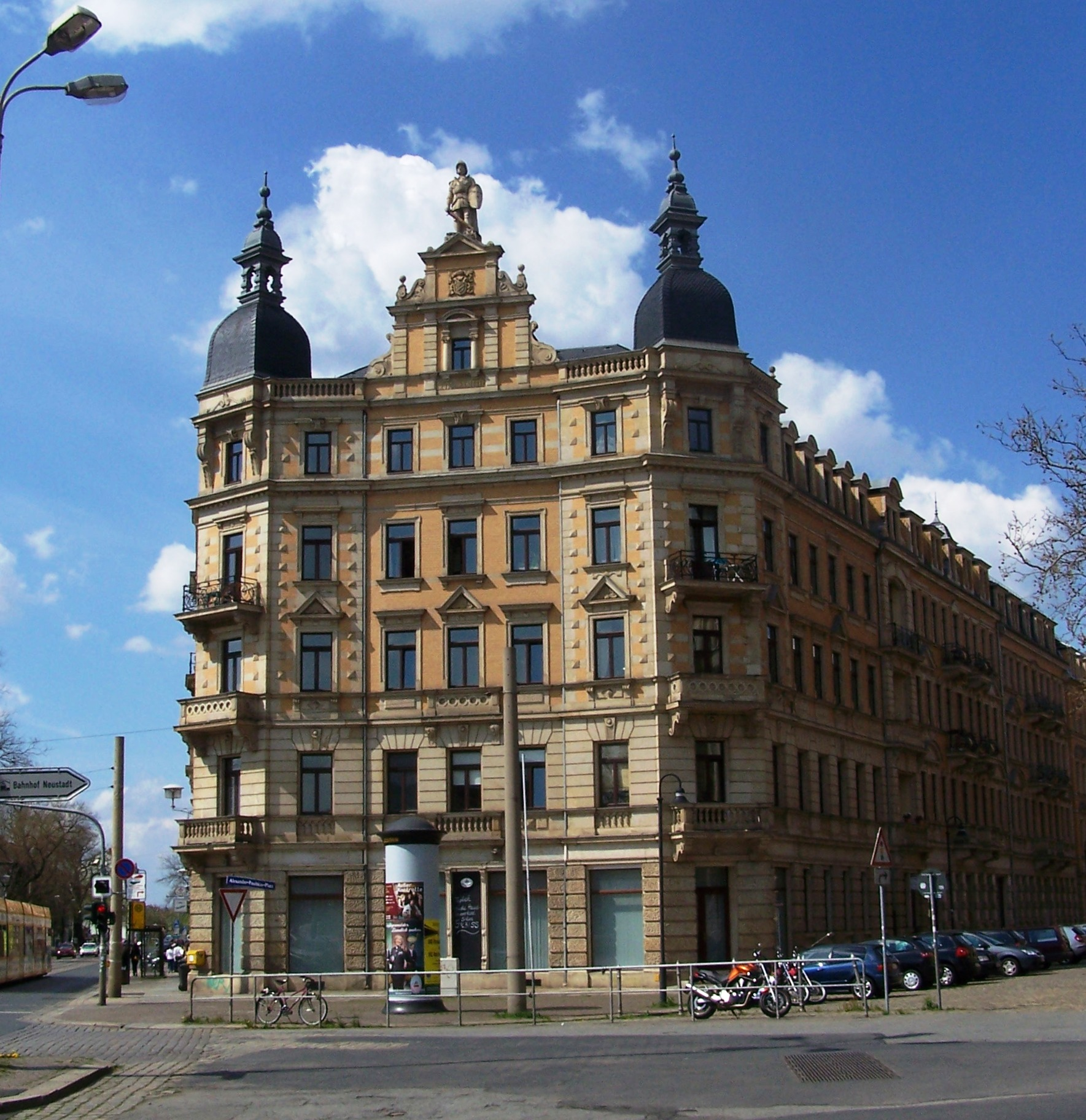 Markantes Eckhaus "Zum Deutschen Ritter" in der Leipziger Vorstadt in Dresden